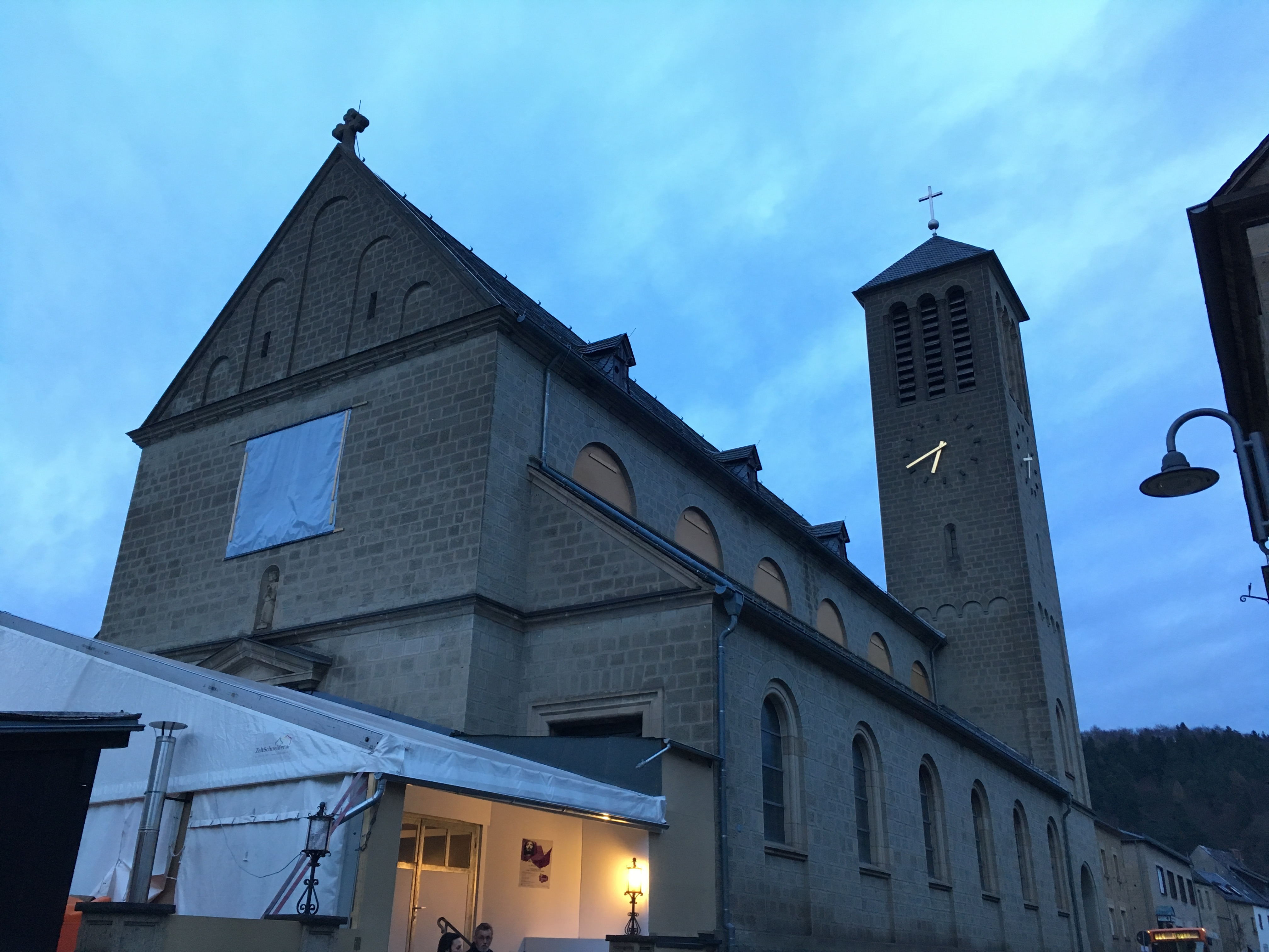 Pfarrkirche St. Hubertus in Rieden, Rheinland-Pfalz, aufgenommen während der Passionsspiele